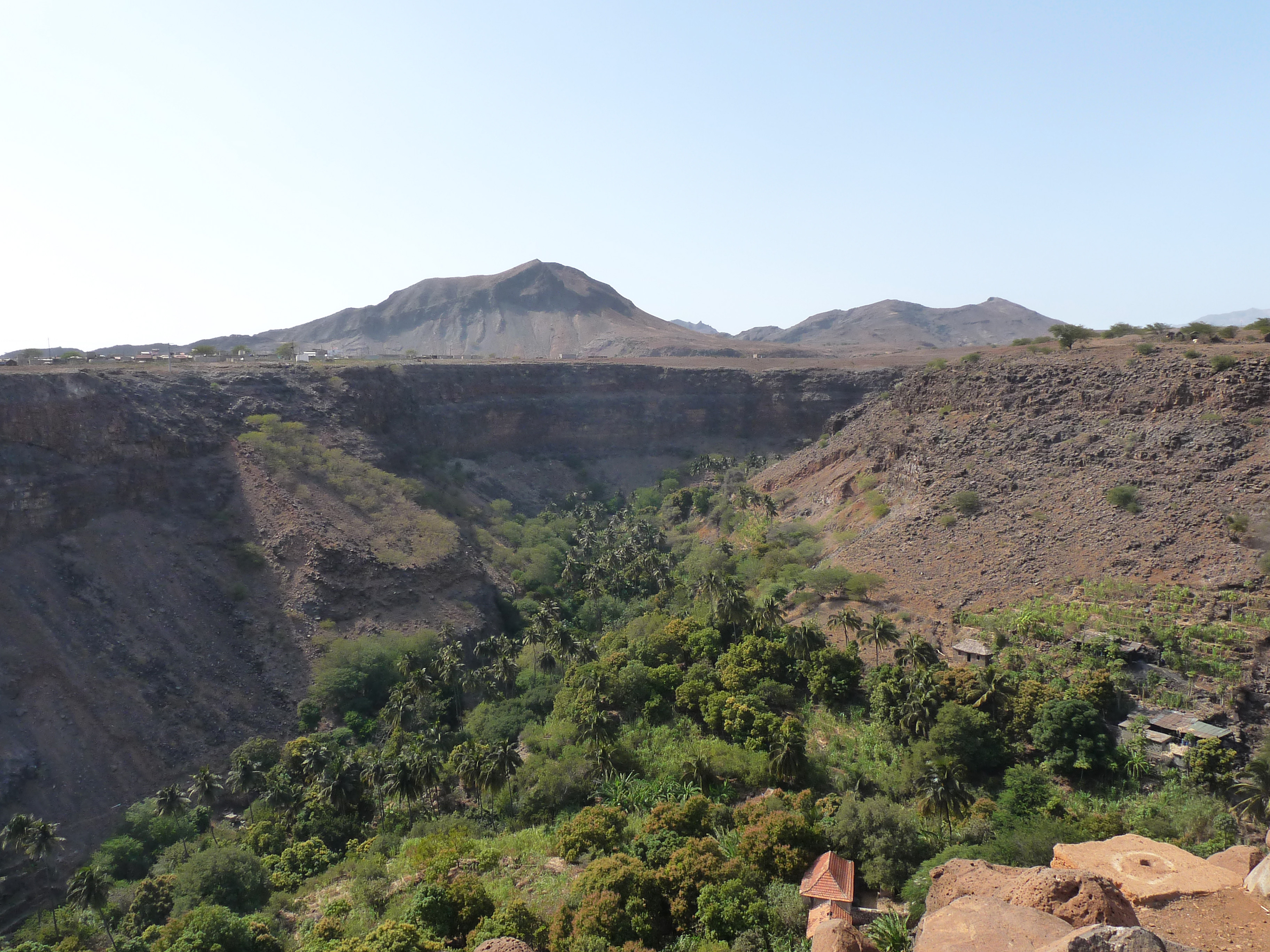 Vallée de Ribeira Grande de Santiago (Cap-Vert)